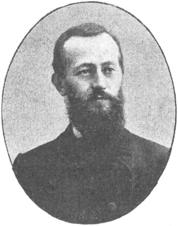 "Le bureau de la Chambre des députés" : "M. Jourde, secrétaire".